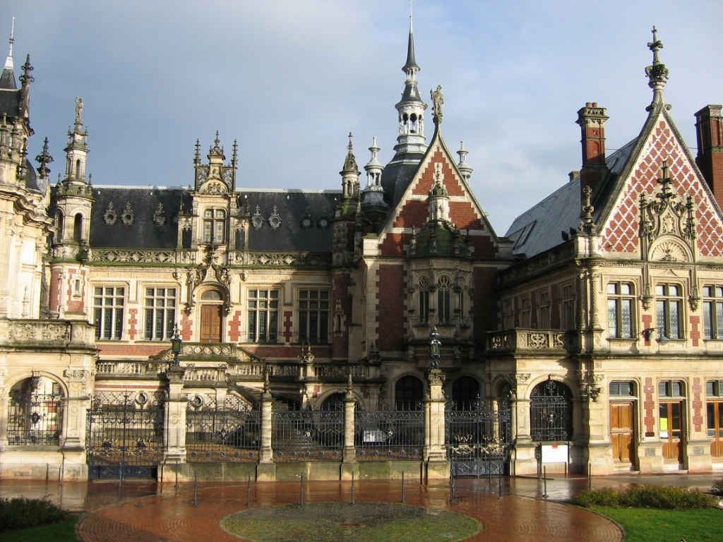 Palais de la Bénédictine, Fécamp, Seine-Maritime/ Photographie personnelle prise par l'utilisateur Urban, décembre 2004/ GFDL Urban